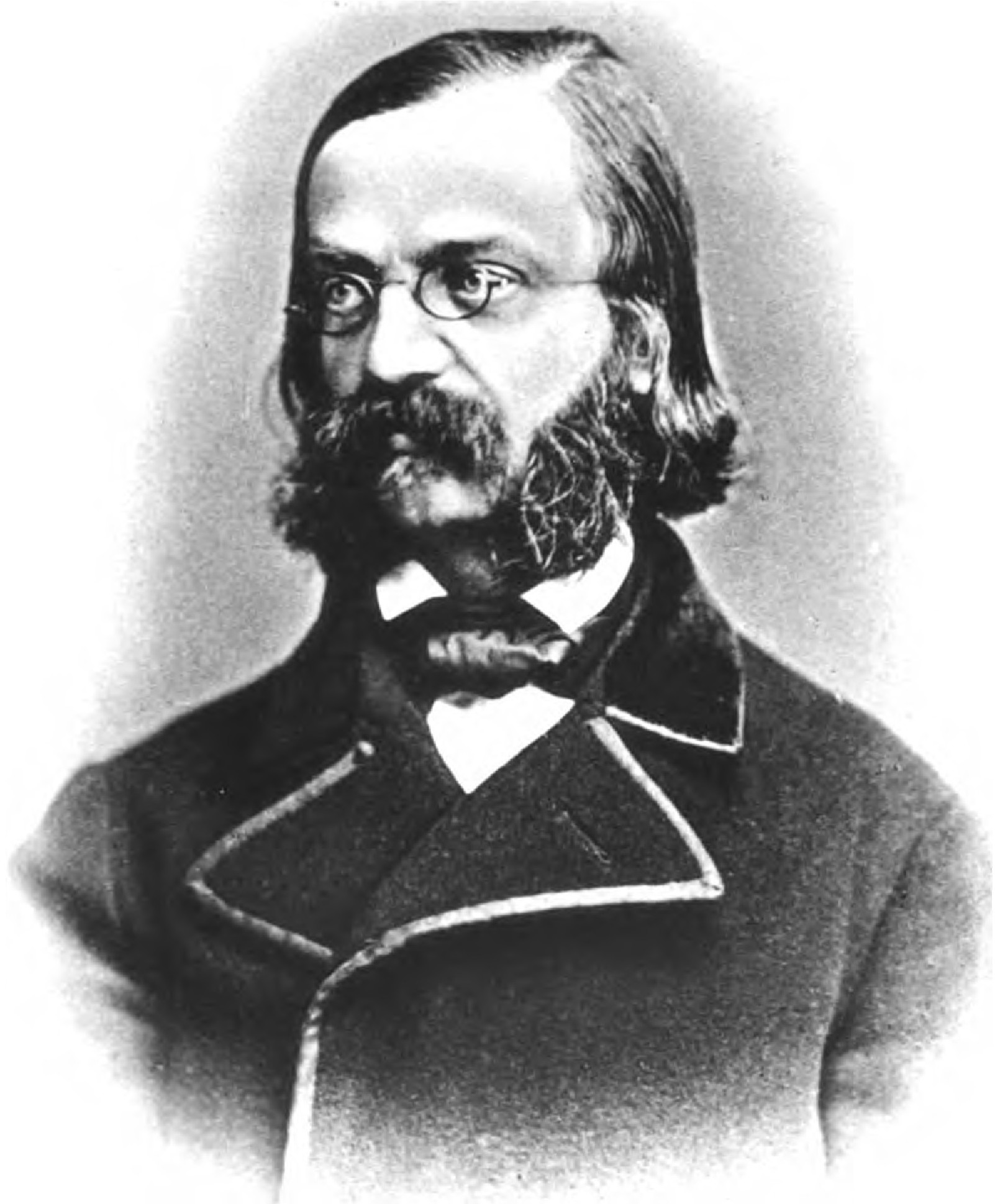 Reinhold Köhler (Wikipedia: en, de). In: Zeitschrift des Vereins für Volkskunde, Band 2. Berlin: Asher & Co., 1892.